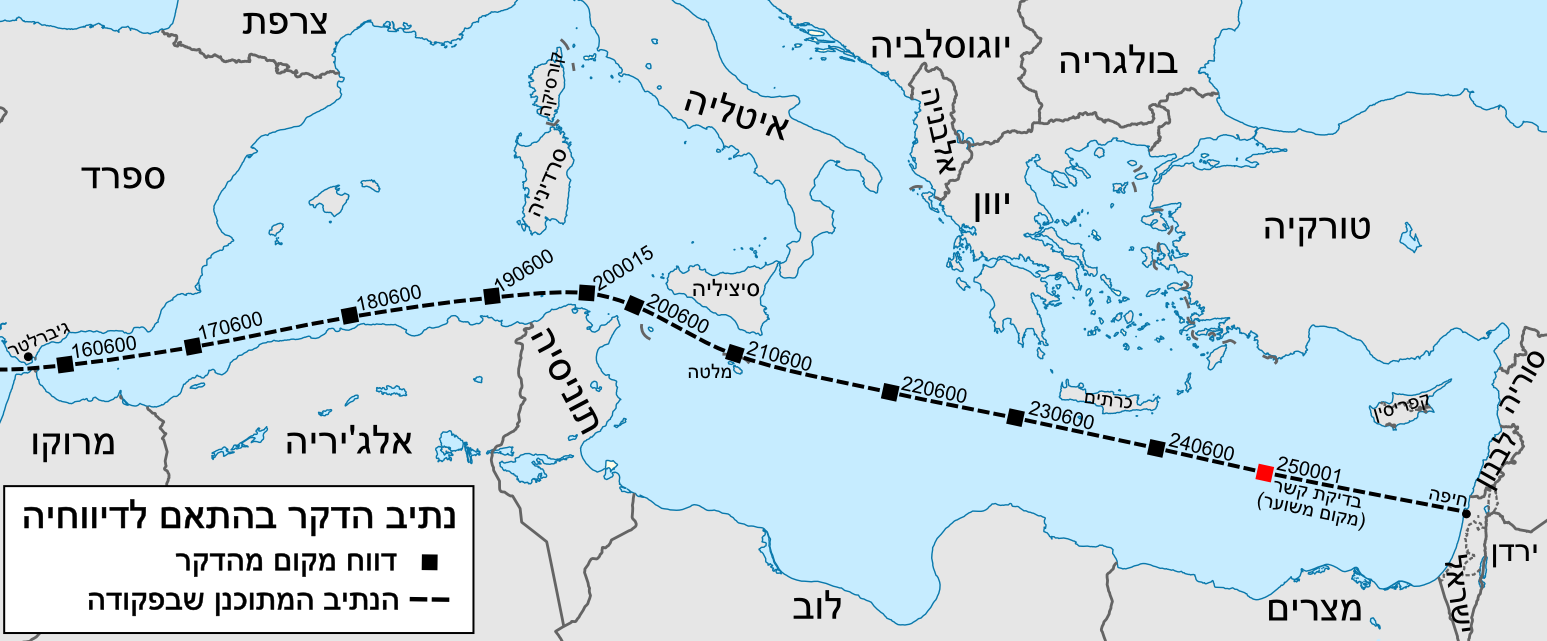 נתיב הדקר בהתאם לדיווחיה (גרסה חדשה לקובץ זה)